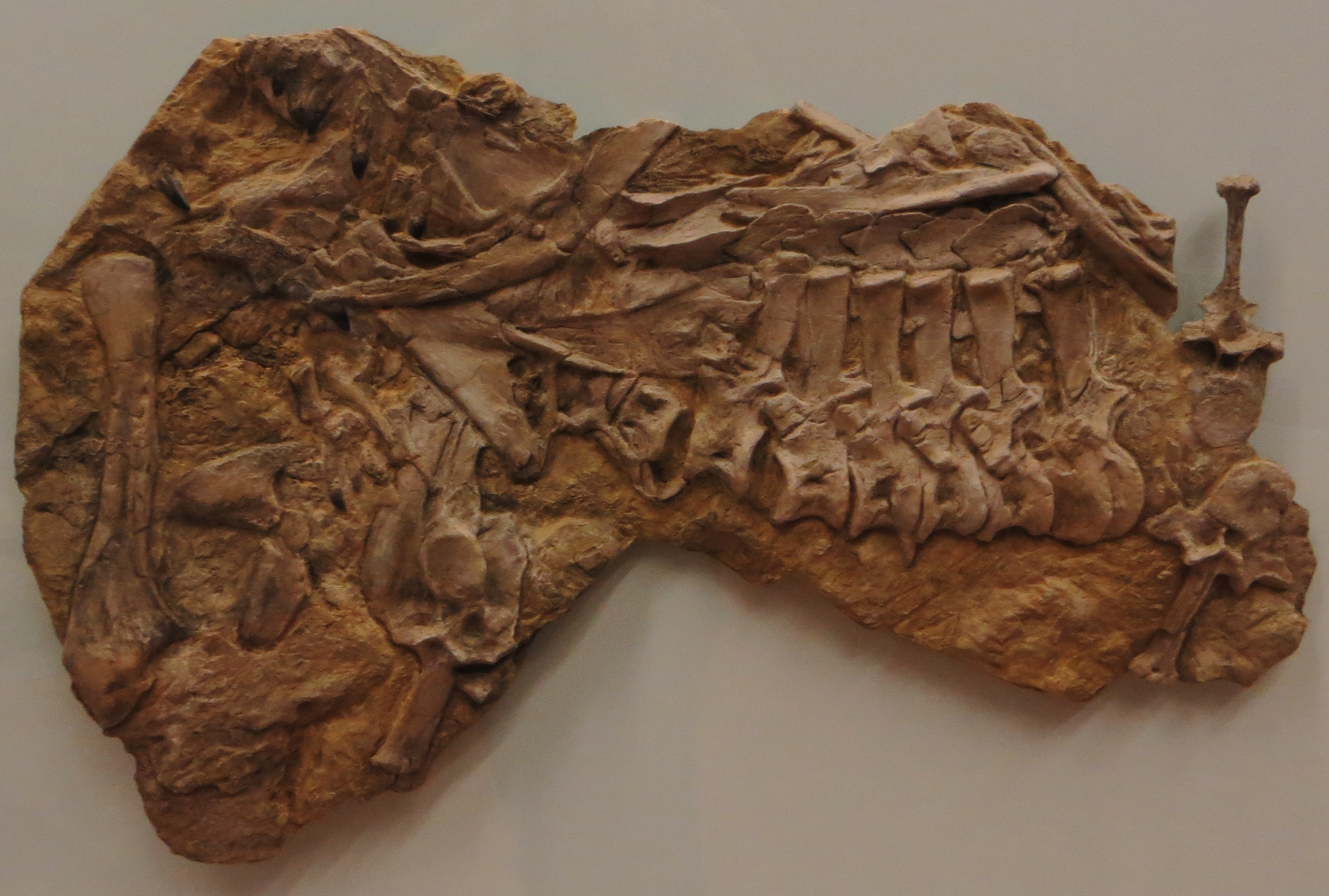 Fossil of Batrachotomus- Took the picture at Museum am Lowentor, Stuttgard